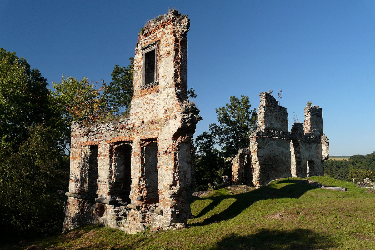 Zřícenina hradu Zásadka